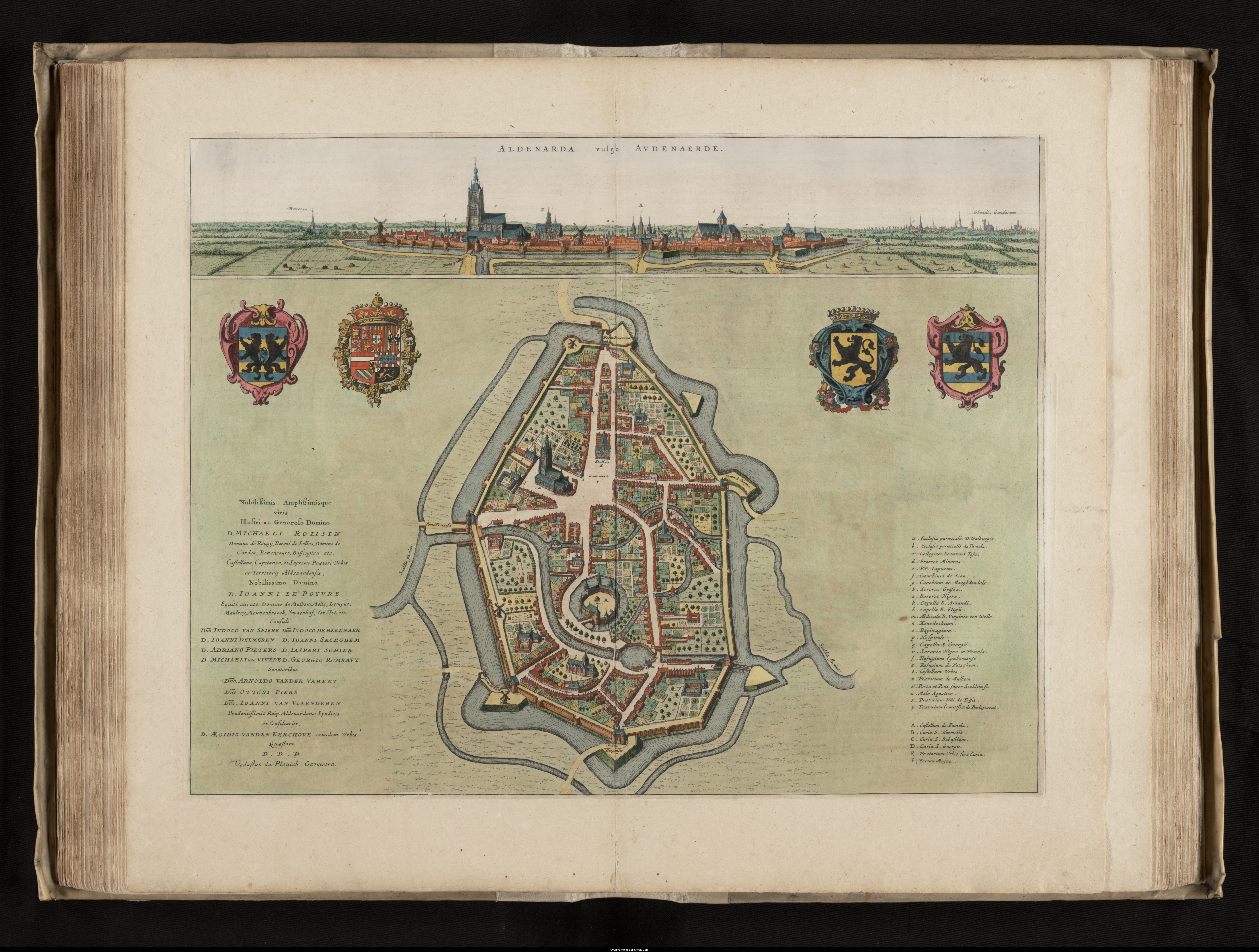 Oudenaarde in de eerste helft van de 17e eeuw (afbeelding uit Flandria Illustrata - 1641)